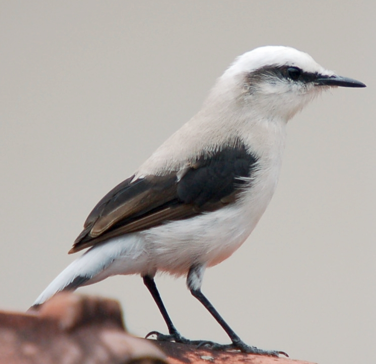 Fluvicola nengeta (en)=Masked Water Tyrant; (pt-Br)=Lavadeira-mascarada pássaro brasileiro